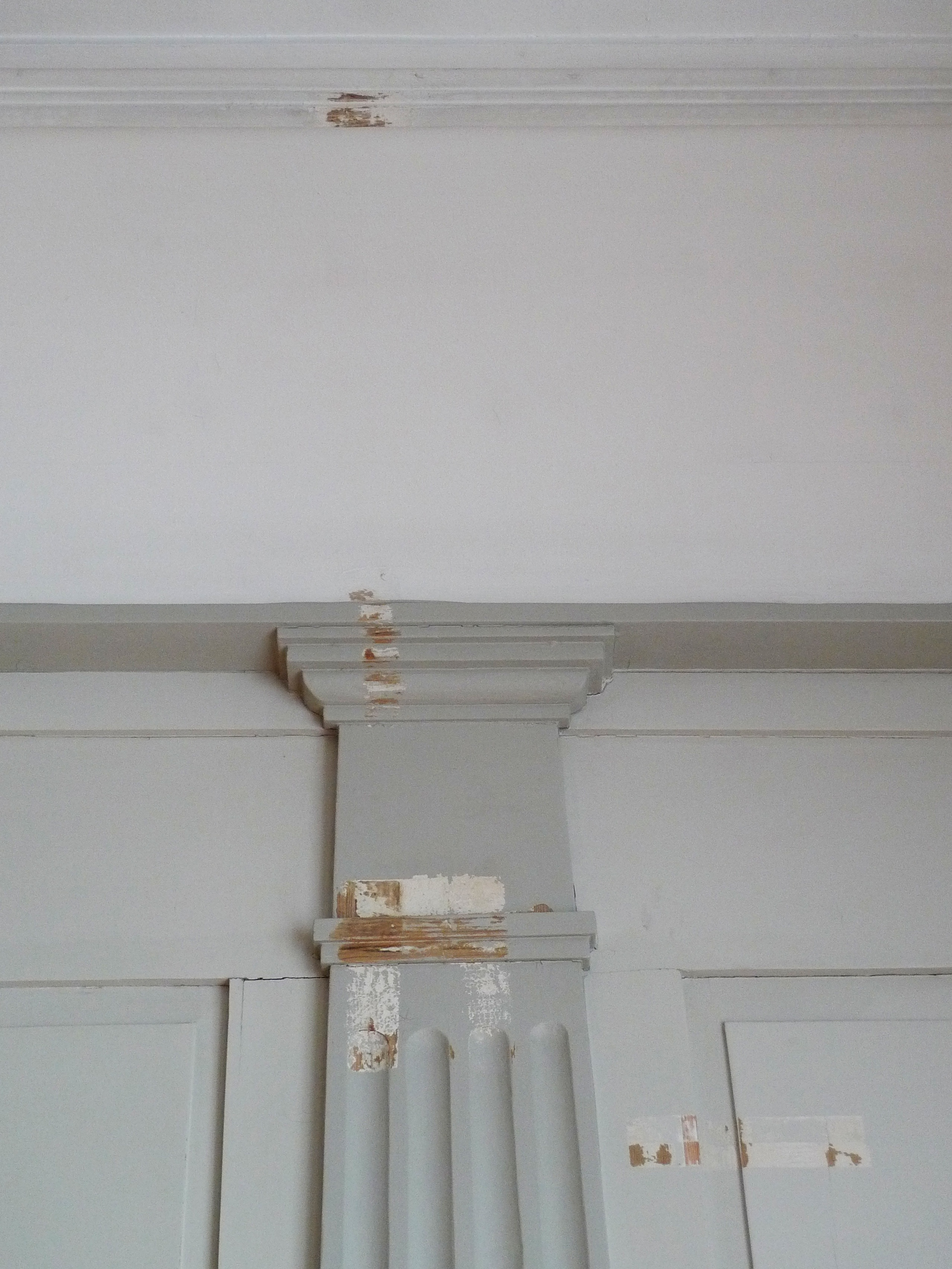 fargetrapp, pilaster, veggpanel og taklist, salen andre etasje